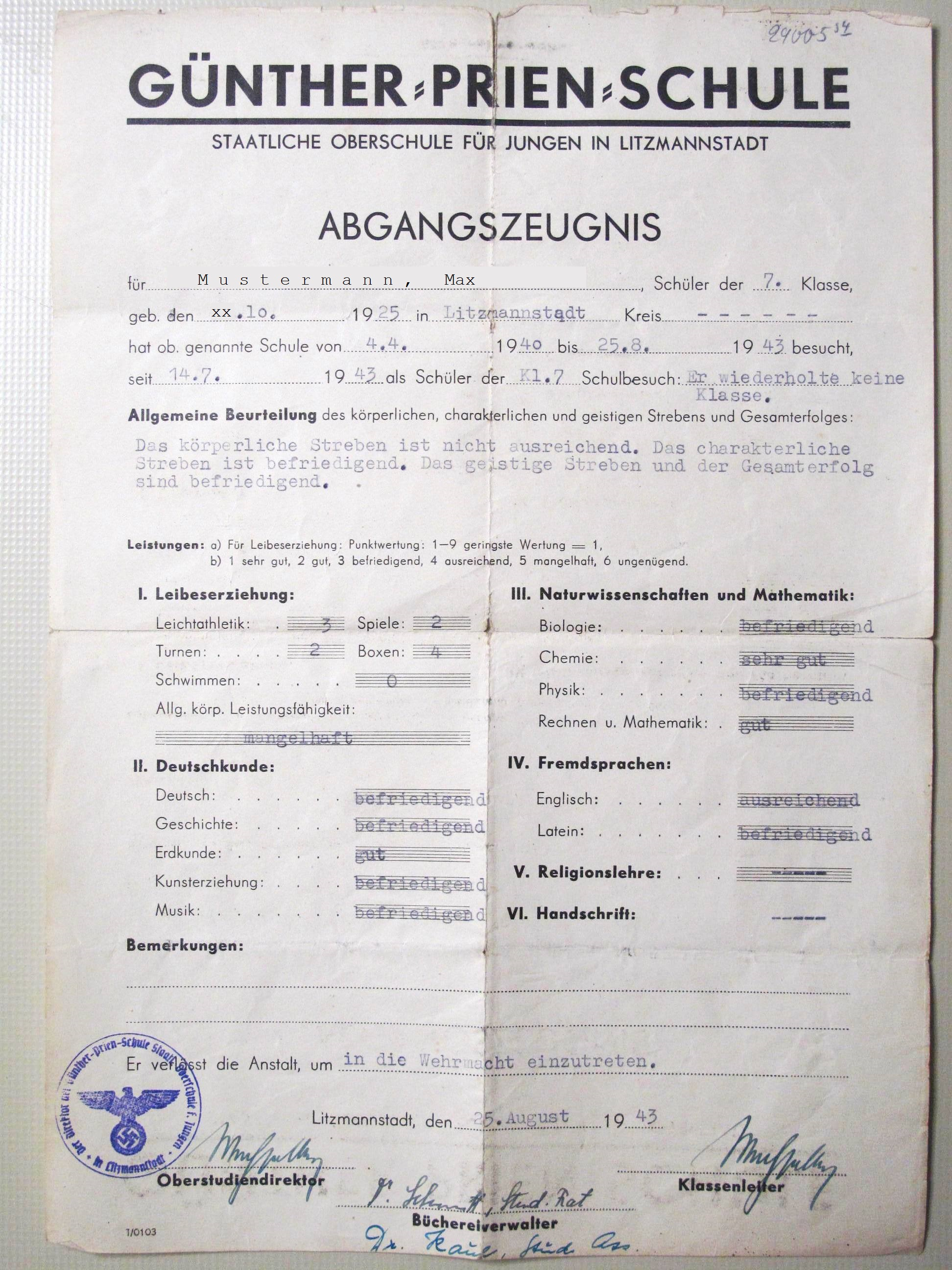 Abgangszeugnis der Günther-Prien-Schule (Staatliche Oberschule für Jungen) in Litzmannstadt (Lodz) für einen Schüler (Name geändert) der 7. Gymnasiumsklasse (entspricht der heutigen Jahrgangsstufe 11) vom 25. August 1943 anlässlich der Einberufung zur Wehrmacht